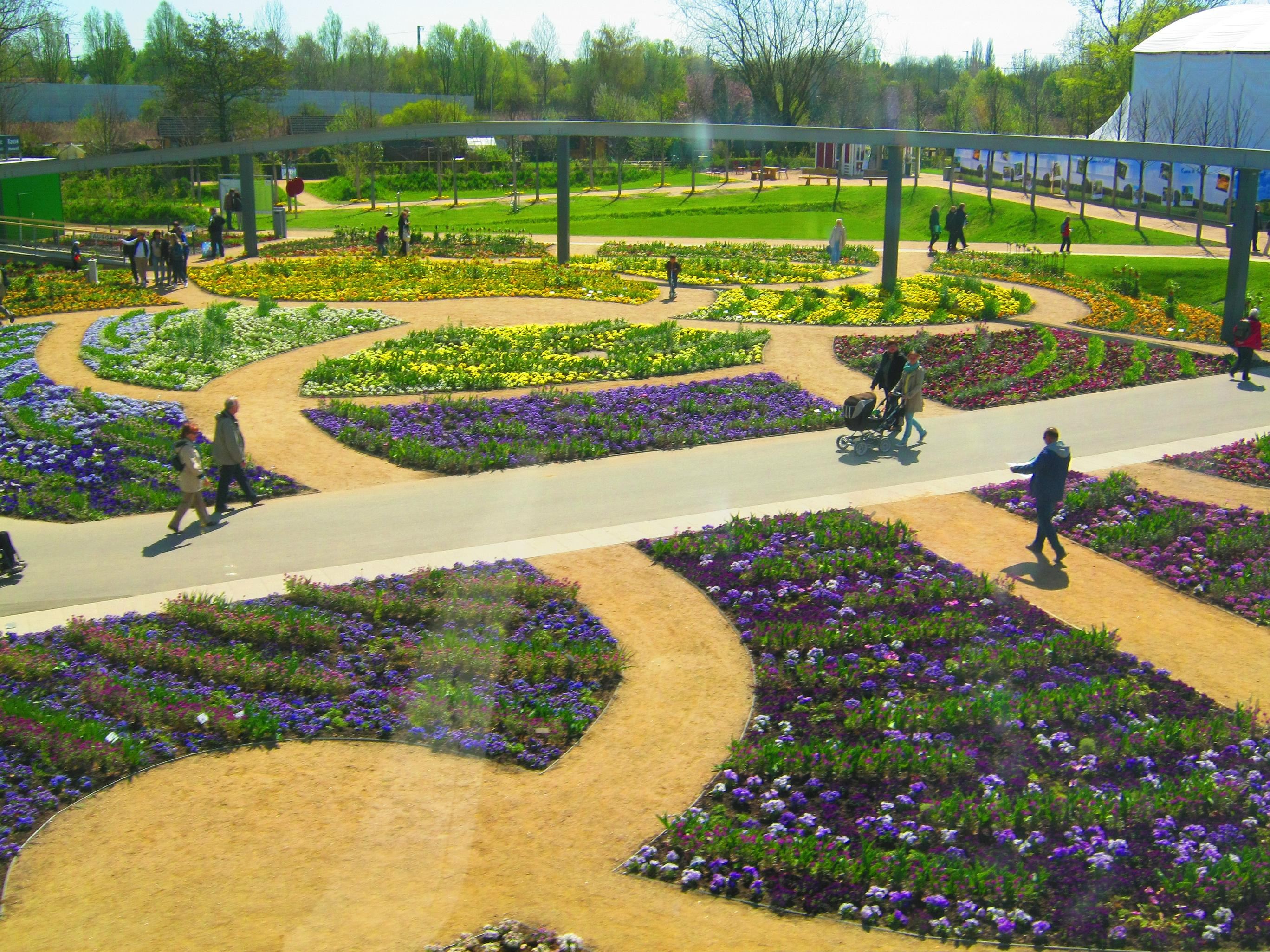 Blumenbeete auf der Internationalen Gartenschau Hamburg 2013 in Hamburg-Wilhelmsburg.